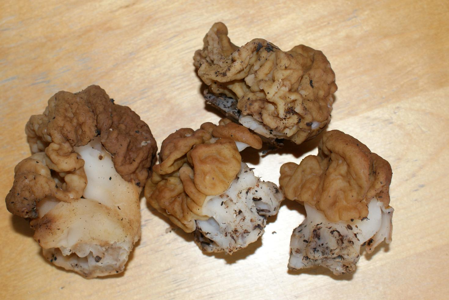 Gyromitra gigas fungi